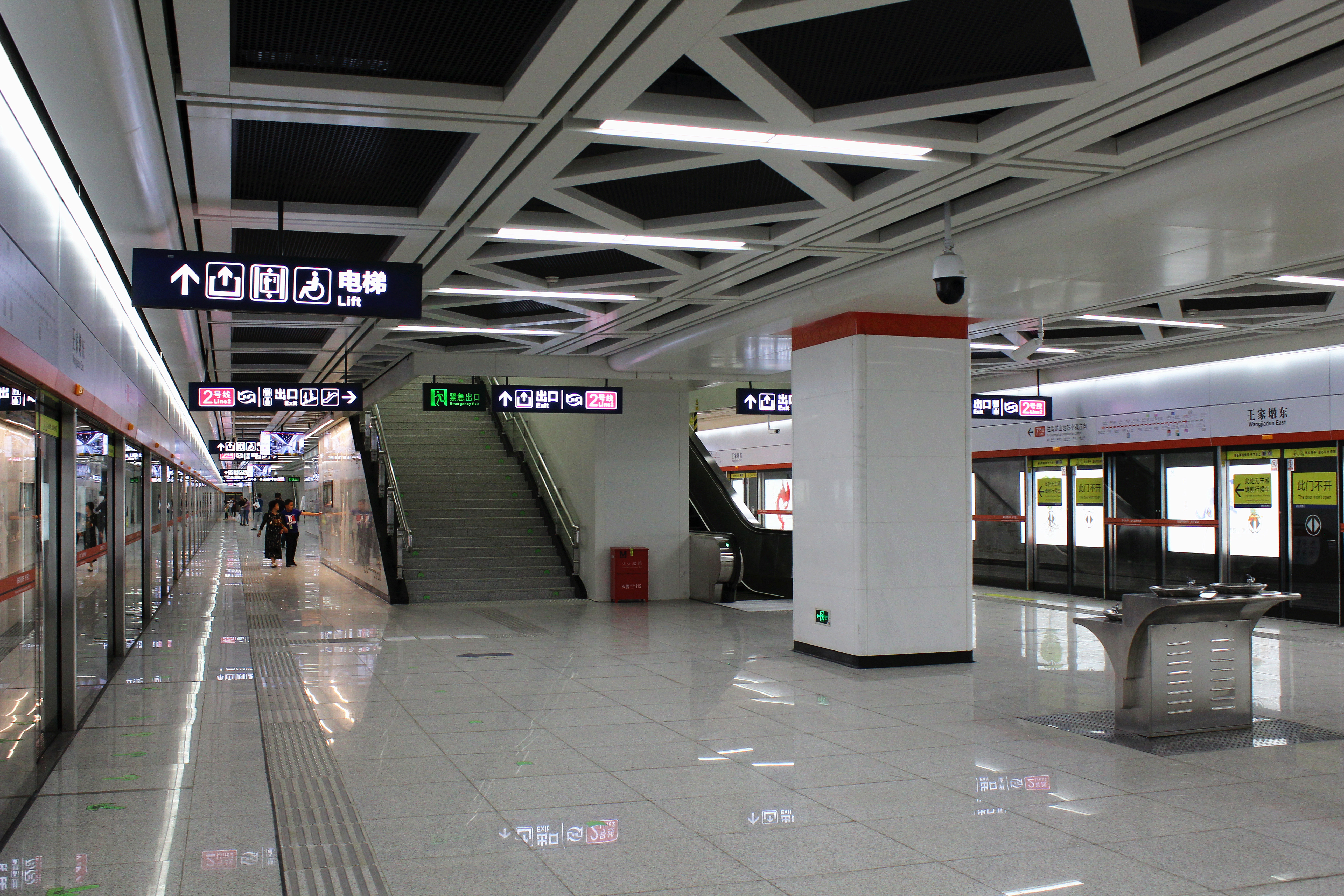 武汉地铁7号线王家墩东站站台